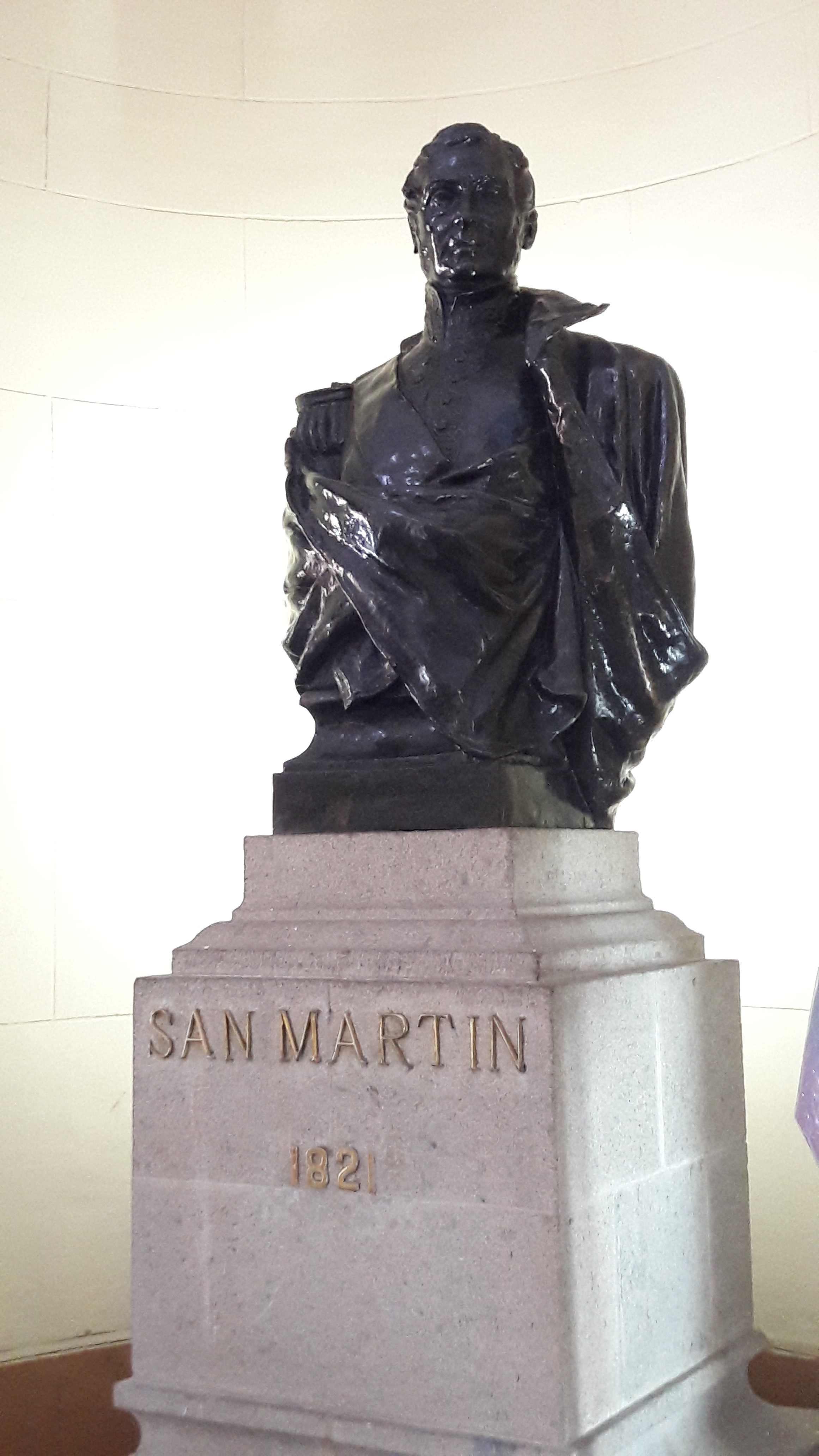 San Martín 1821